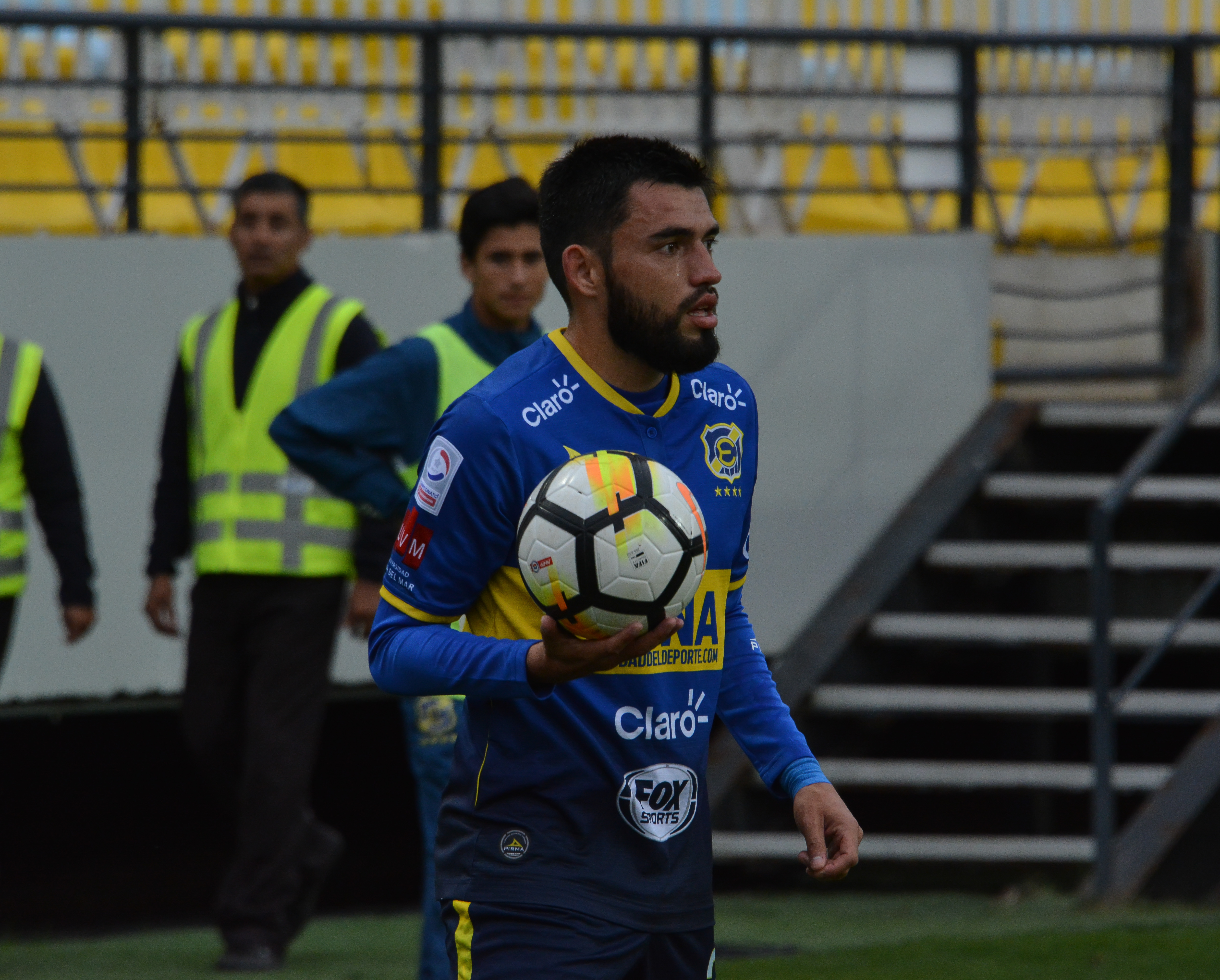 Everton v Unión Española, Estadio Sausalito, Viña del Mar, Chile.